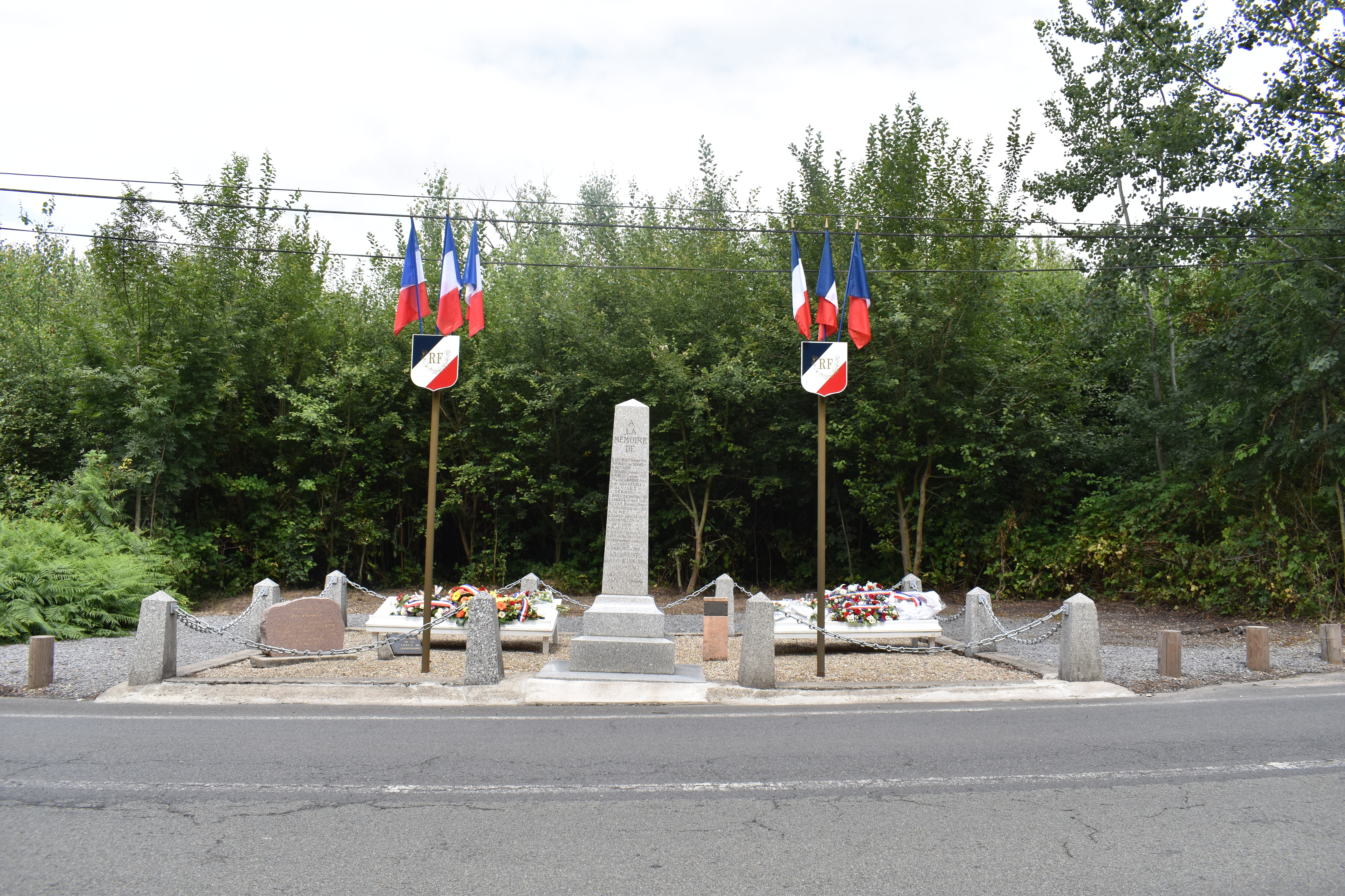 Le 12 août 1944, au lieu-dit« Les Quatre Chênes », commune de Domont (aujourd’hui dans le Val-d’Oise), un franc-tireur isolé fait feu sur deux soldats allemands, dont un capitaine. La réplique est sanglante. Deux hommes sont fusillés sur place,Eugène Duhamel et Henri Morlet. Un groupe d’enfants est mitraillé : Robert Meunier, 15 ans, s’écroule criblé de balles. Un passant, Robert Arrondeau est abattu ; sa femme se précipite vers sa dépouille en hurlant « Assassins ! »une grenade lui explose au visage… Le 15 août, à la gare de Pantin (aujourd’hui en Seine-Saint-Denis) un commando SS extrait d’un convoi de déportés en partance pour les camps, le colonelAndré Rondenay, patriote ayant gagné l’Angleterre dès 1942, parachuté en France, spécialiste du sabotage industriel, prisonnierévadé… Il est emmené avec Louis Lebauge, André Baude, Roger Claie, Alain de Beaufort, jusque dans la clairière des« Quatre Chênes » où ils sont massacrés. Le 13 août, à Nerville-la-Forêt (Val d’Oise) un groupe de maquisards fait deux prisonniers allemands finalement libérés en rase campagne. Deux jours plus tard un détachement SS, comptant quelques français en son sein, encercle le village, l’incendie et rassemble les Nervillois âgés de 16 à 30 ans. Treize d’entre eux sont massacrés : Alviset Pierre, Debris Jacques, Defontaine Auguste, Douay Henri, Duclos Paul, Duret Robert, Gourrier Robert, Grandjean Georges, Harlay Marcel, Lamart Lucien, Lerouge Louis, Queux Robert, Sadier Henri. Alain Simonnet